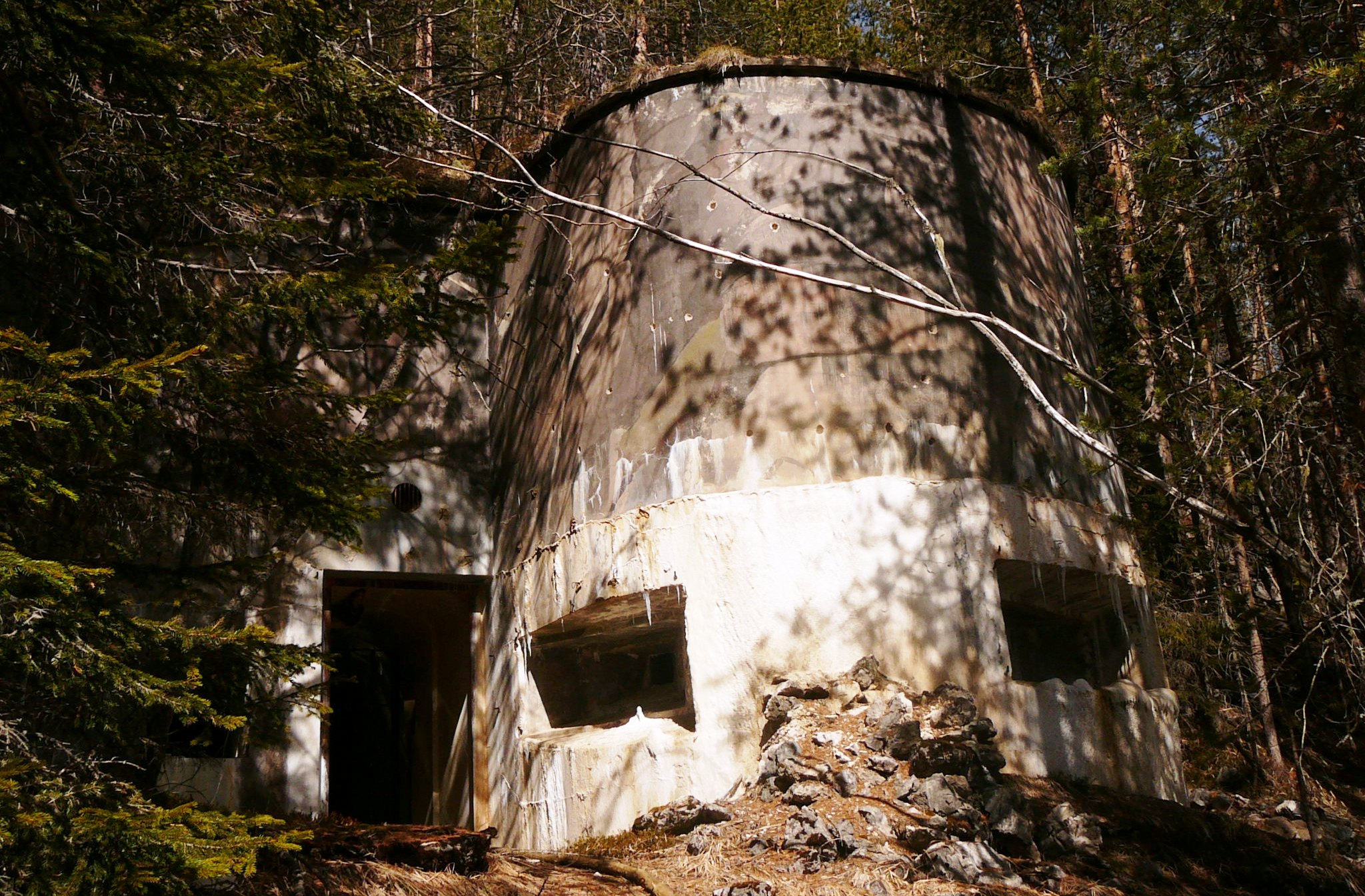 opera 1 cimabanche